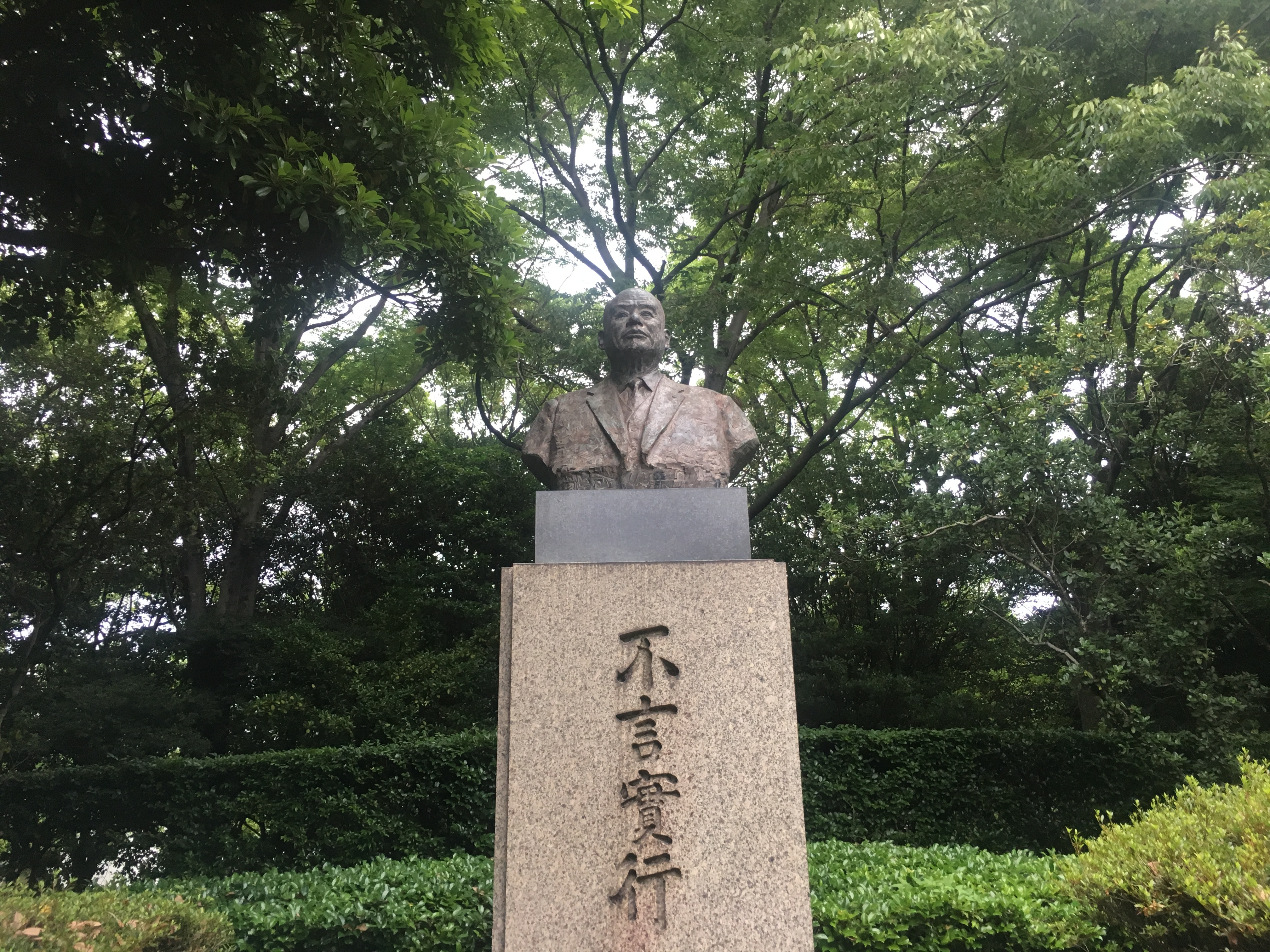 中部大学の創設者、三浦幸平氏の像。